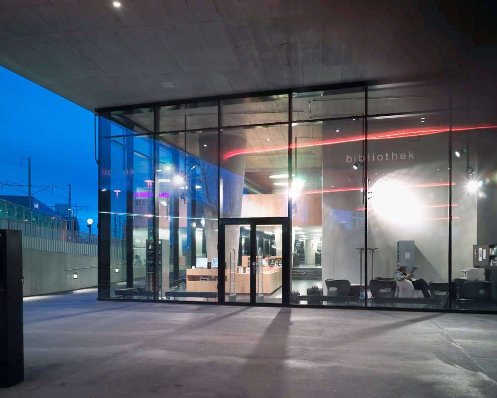 Pesstalzzi-Bibliothek Zürich, Bibliothek Altstadt